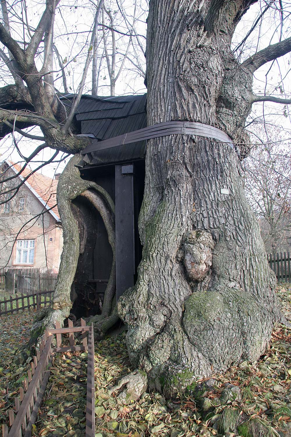 Dutina Klokočovské lípy autor: Zp datum: 23. 11. 2006